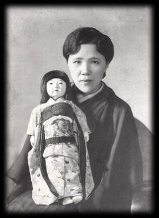 1937年（昭和12年）来日したヘレン・ケラーに渡す、自身で作成した人形と共に